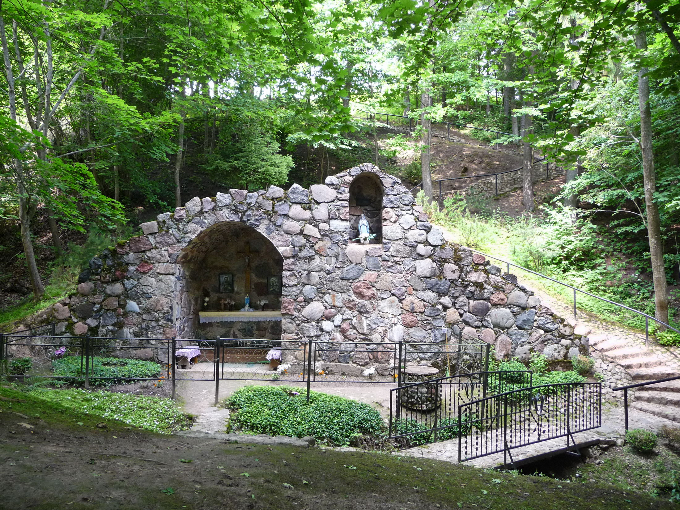 Šventaduobė - lurdas, esantis Plokščių km. (Šakių r.) pakraštyje, Didžiupio upelio slėnyje